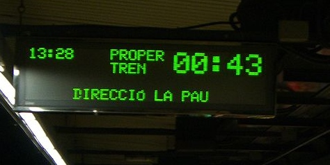 Pantalla informativa sobre la previsió d'arribada del proper tren.